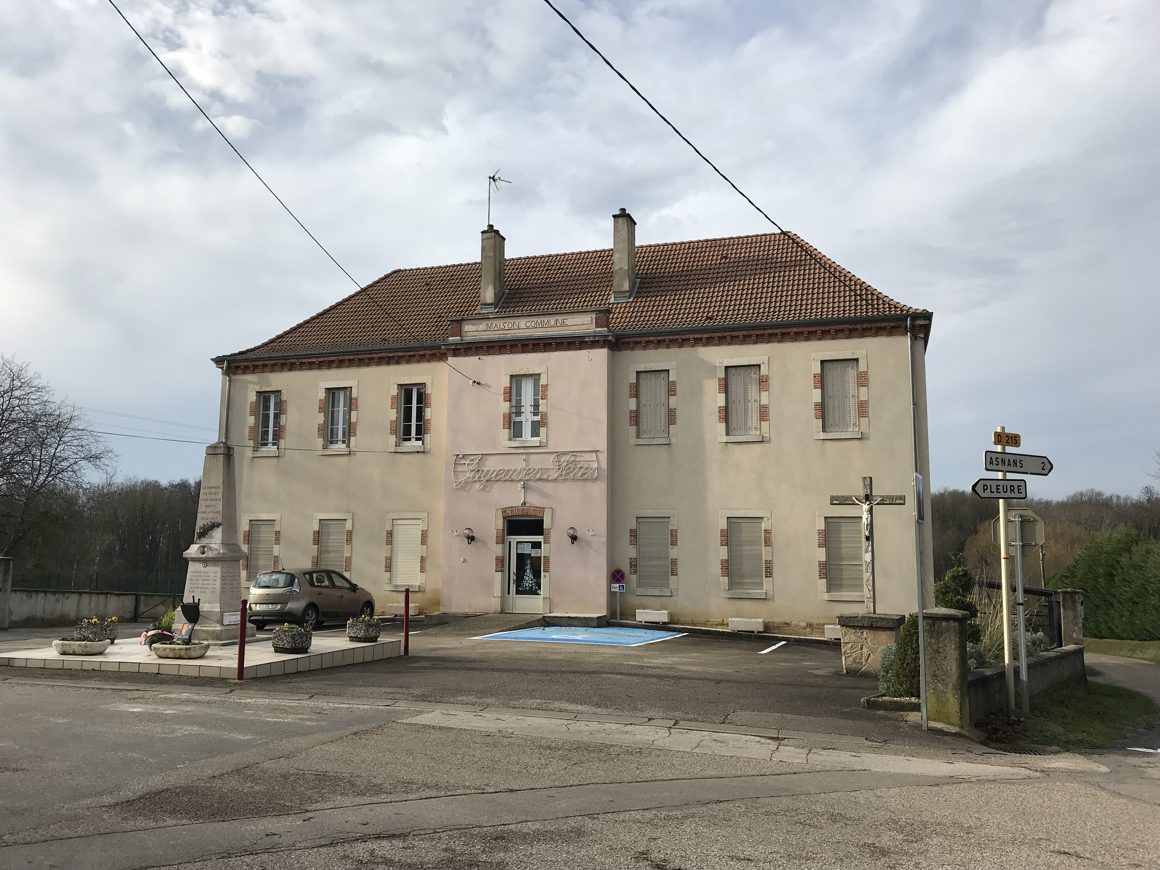 Image de Gatey (Jura, France) en janvier 2018.